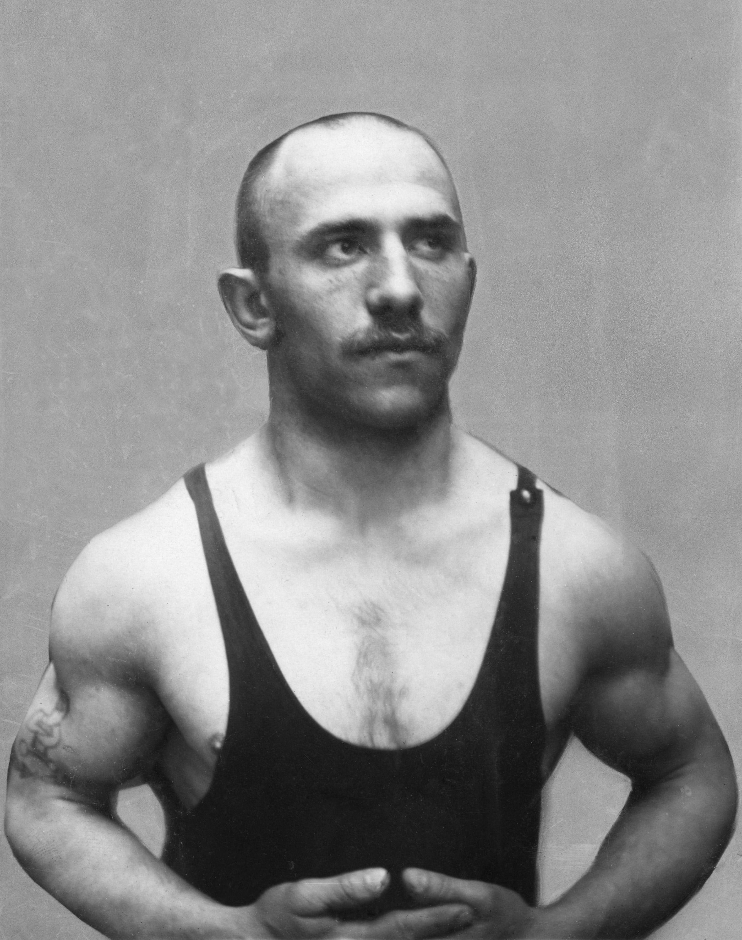 Worstelen, historie. lichtgewichtgewicht Bert Eillebrecht deelnemer aan het Grieks-Romeins worstelen op Olympische Spelen van 1912 in Stockholm, Zweden.